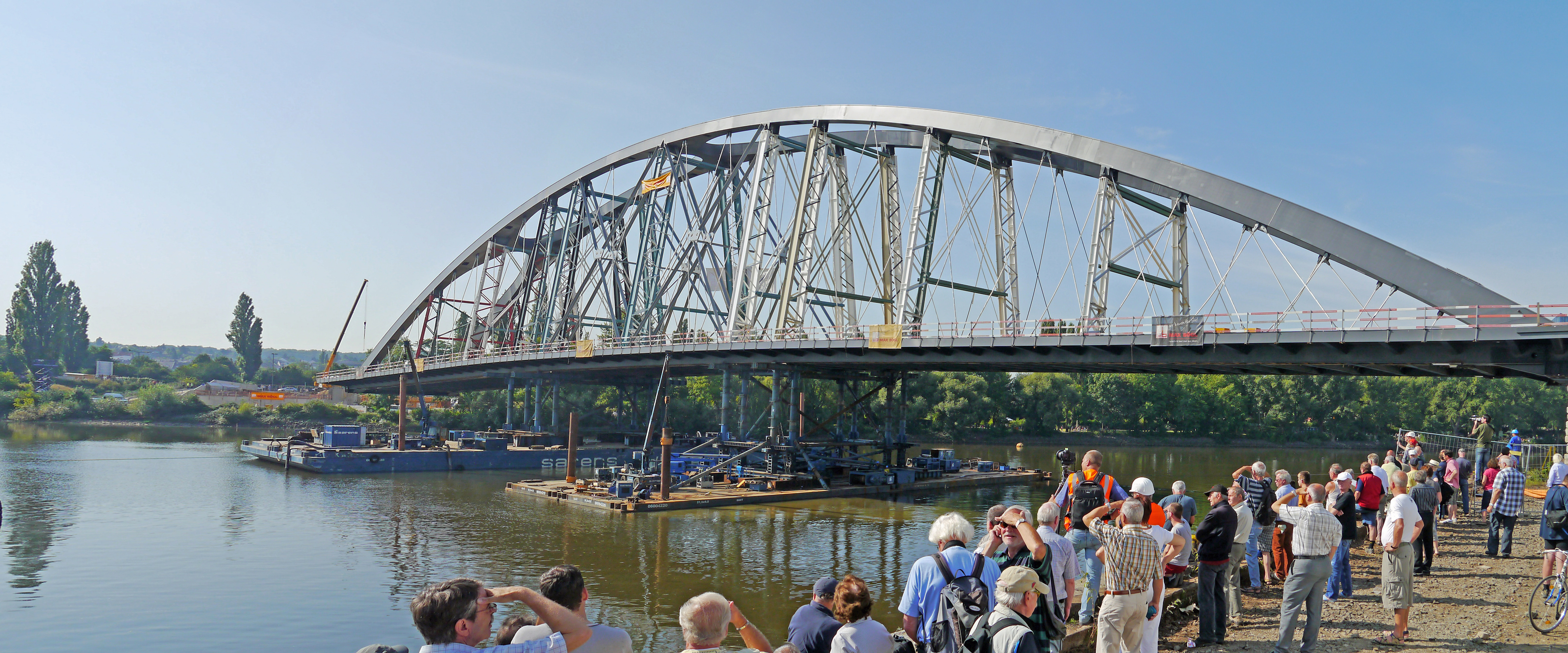 Die Osthafenbruecke waehrend des Einschwimmens, am 23. August 2012, um 9 Uhr 29. Blick vom noerdlichen Mainufer, an der Hafeneinfahrt in Frankfurt am Main.